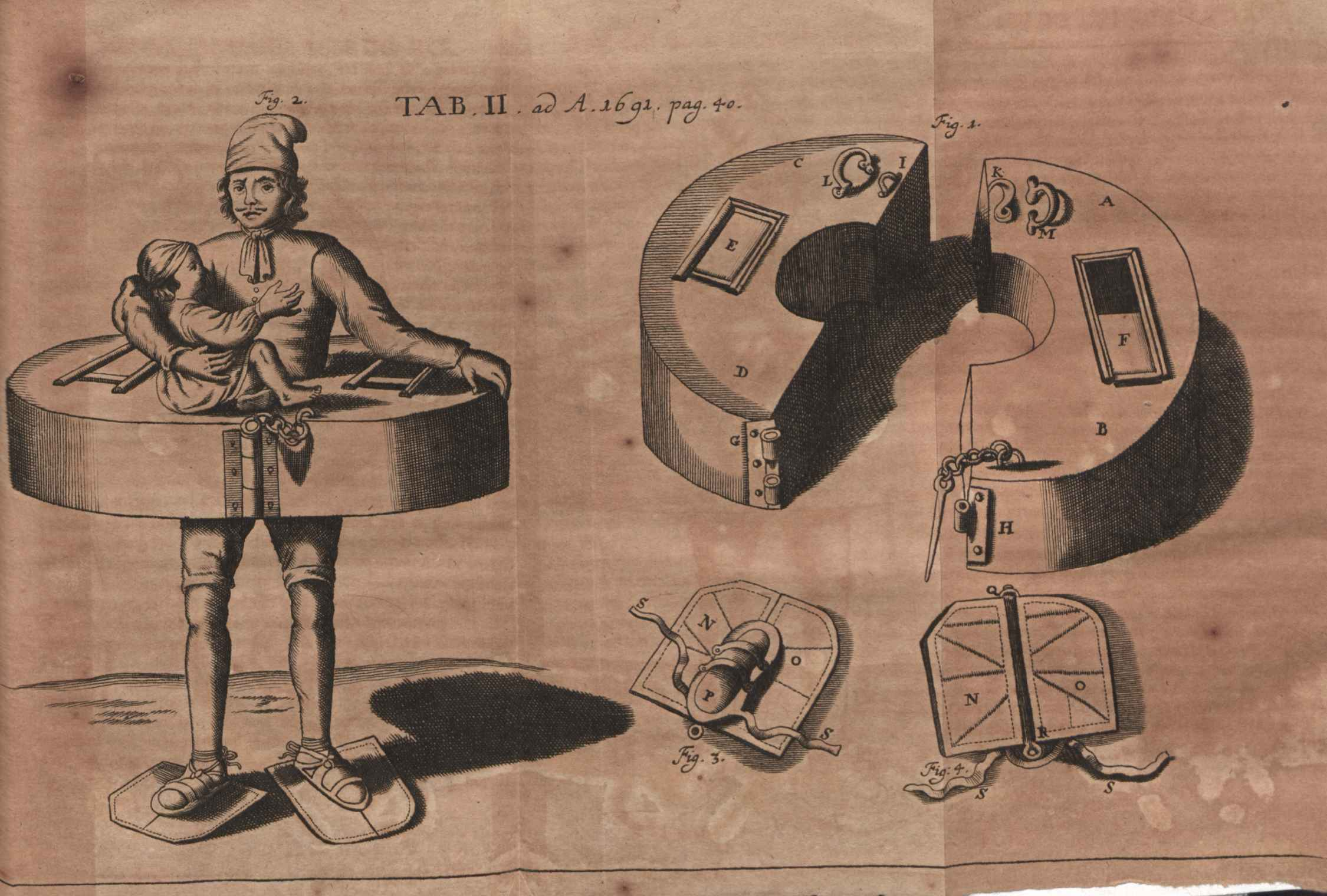 Illustration